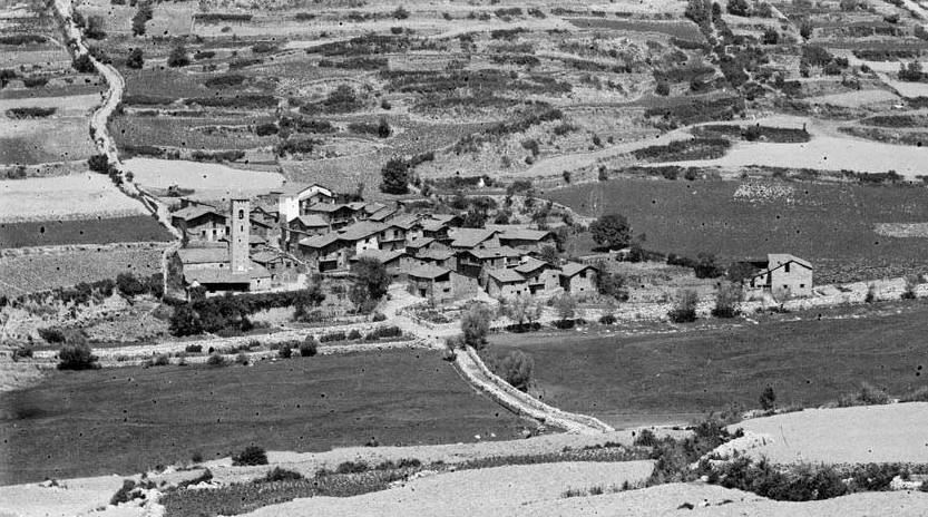 Imatge